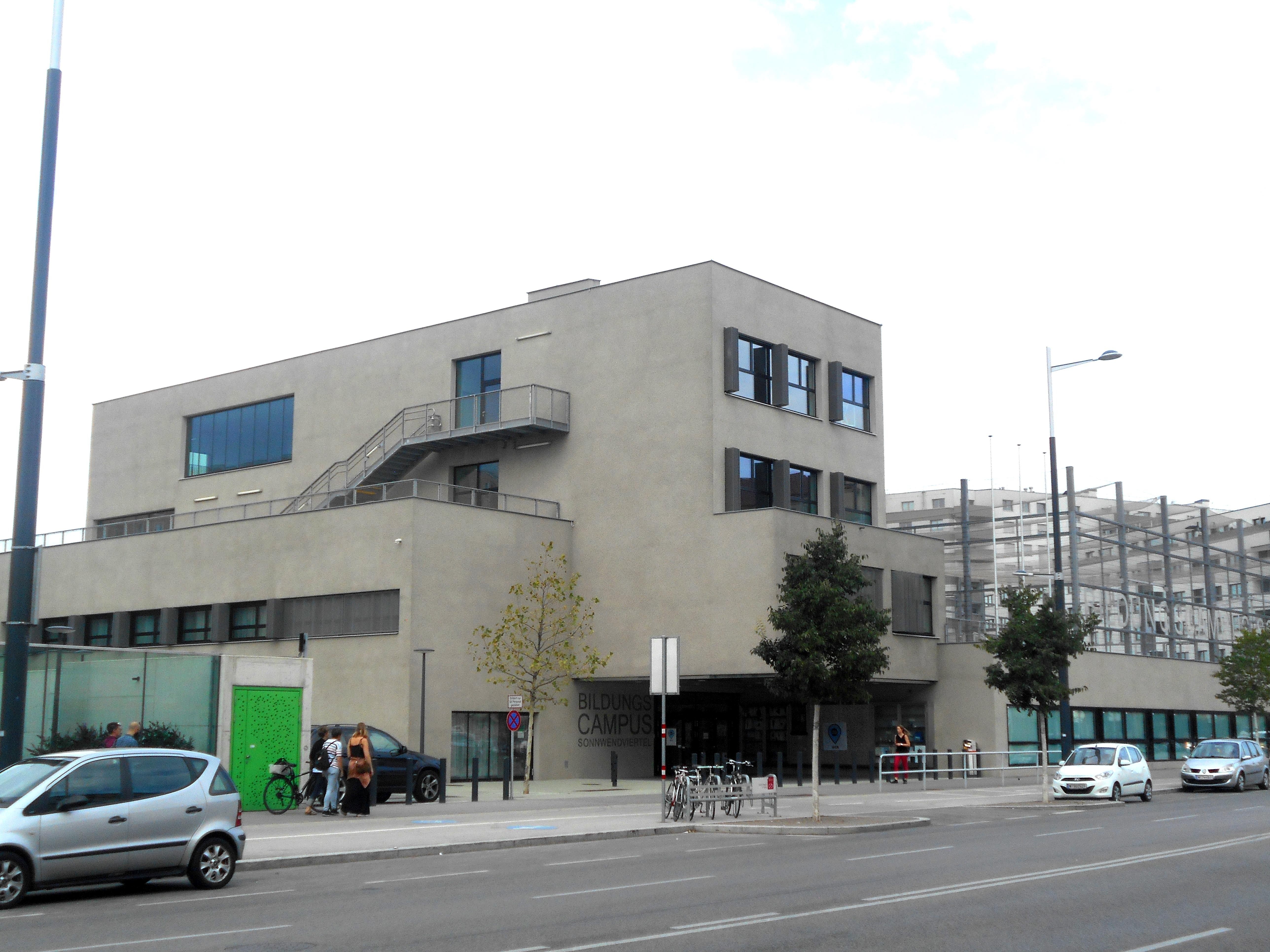 Bildungscampus Sonnwendviertel, Gudrunstraße 110 Diese Datei wurde im Rahmen von WikiDaheim 2018 in Österreich erstellt und hochgeladen.Sie wurde dem Themenbereich Öffentliche Güter zugeordnet.